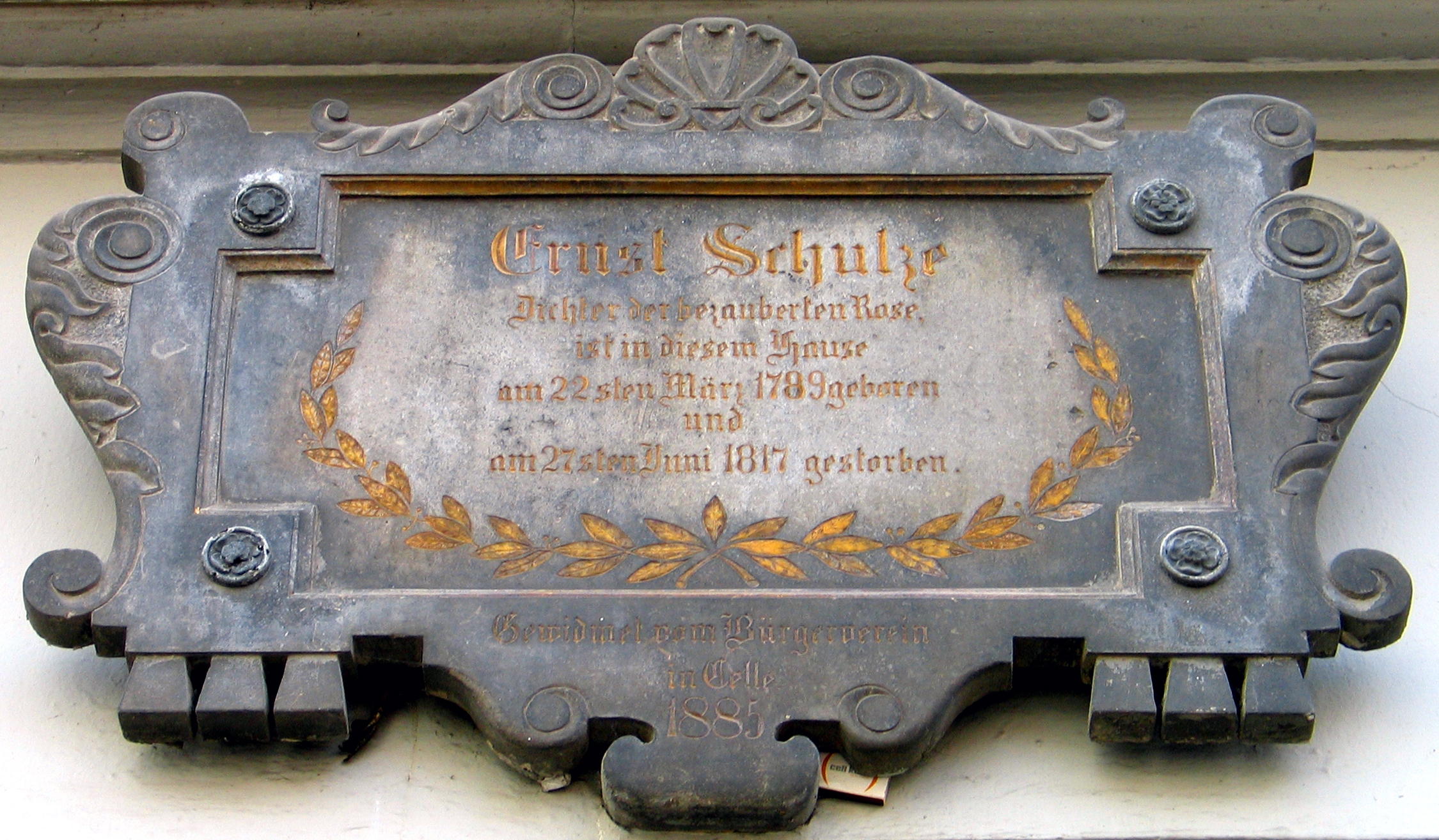 Am Gebäude am Robert-Meyer-Platz 1 (früher: Großer Plan) in Celle findet sich eine sandsteinerne Schmucktafel: „Ernst Schulze, Dichter der bezauberten Rose, ist in diesem Hause a, 22sten März 1789 geboren und am 27sten Juni 1817 gestorben.“ Die Tafel wurde 1885 "gewidmet vom Bürgerverein in Celle" ...